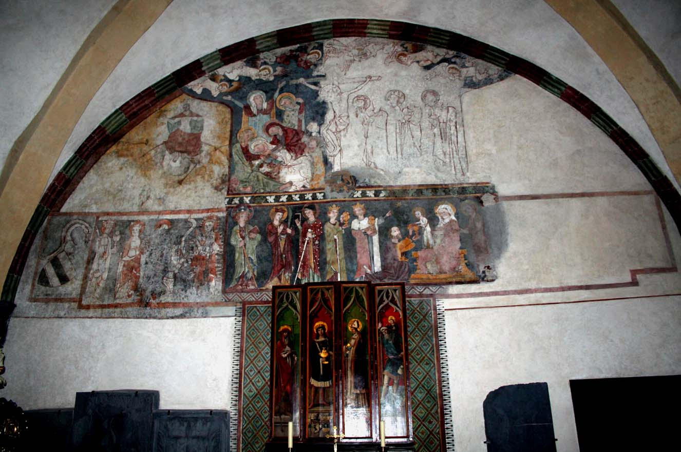 Waltensburger Meister in der Kathedrale von Chur